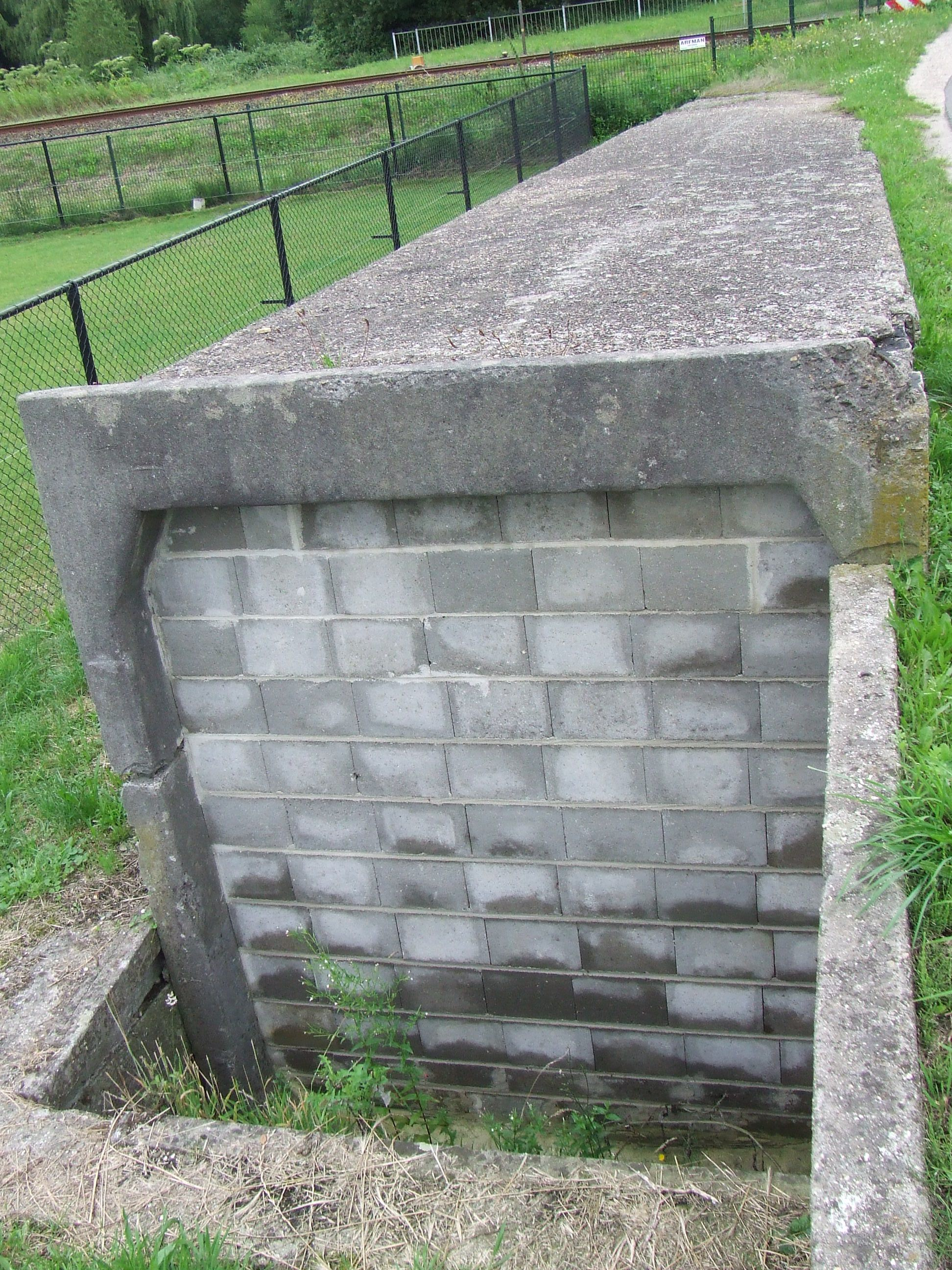 Smalspoortunnel bij Egypte, Tegelen. Dichtgemetselde noordelijke ingang.